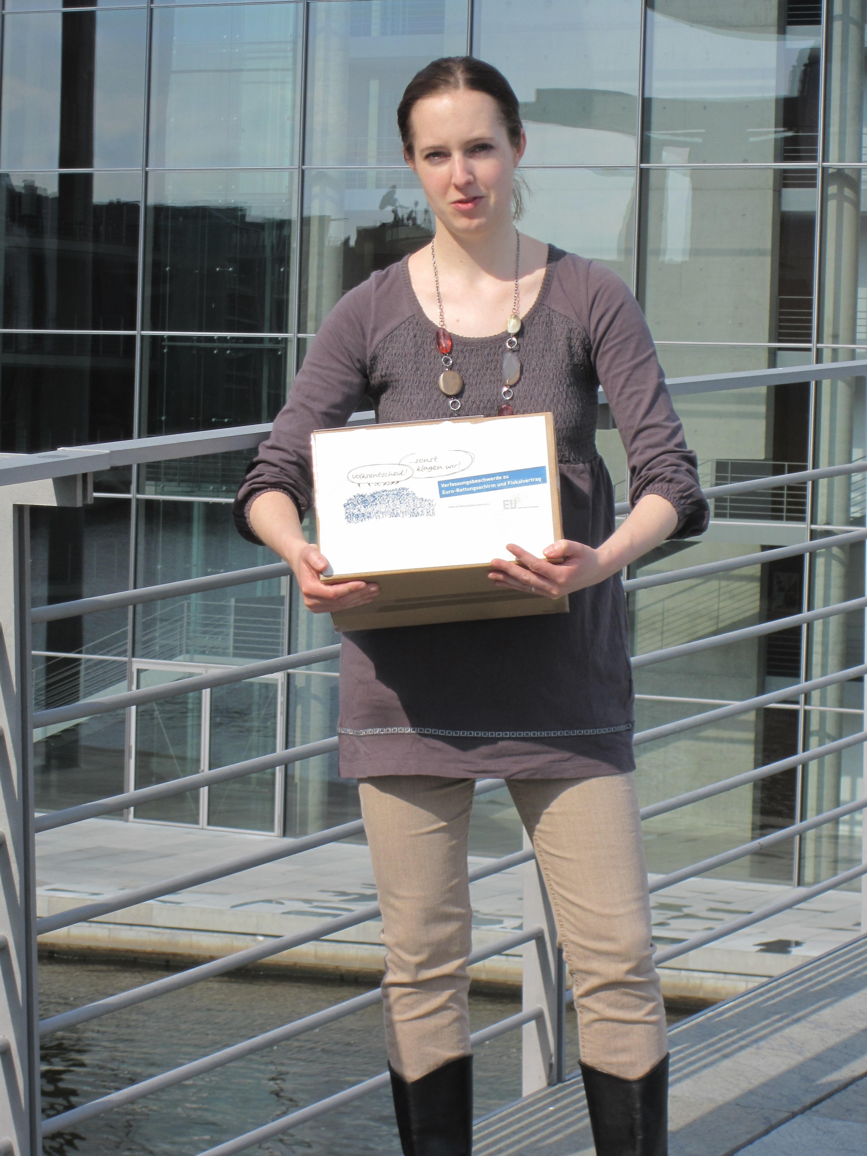 Übergabe gesammelter Unterschriften an Bundestagspräsident Norbert Lammert, die Volksentscheide über die €-Rettungspolitik einfordern, Berlin, 12. Juni 2012